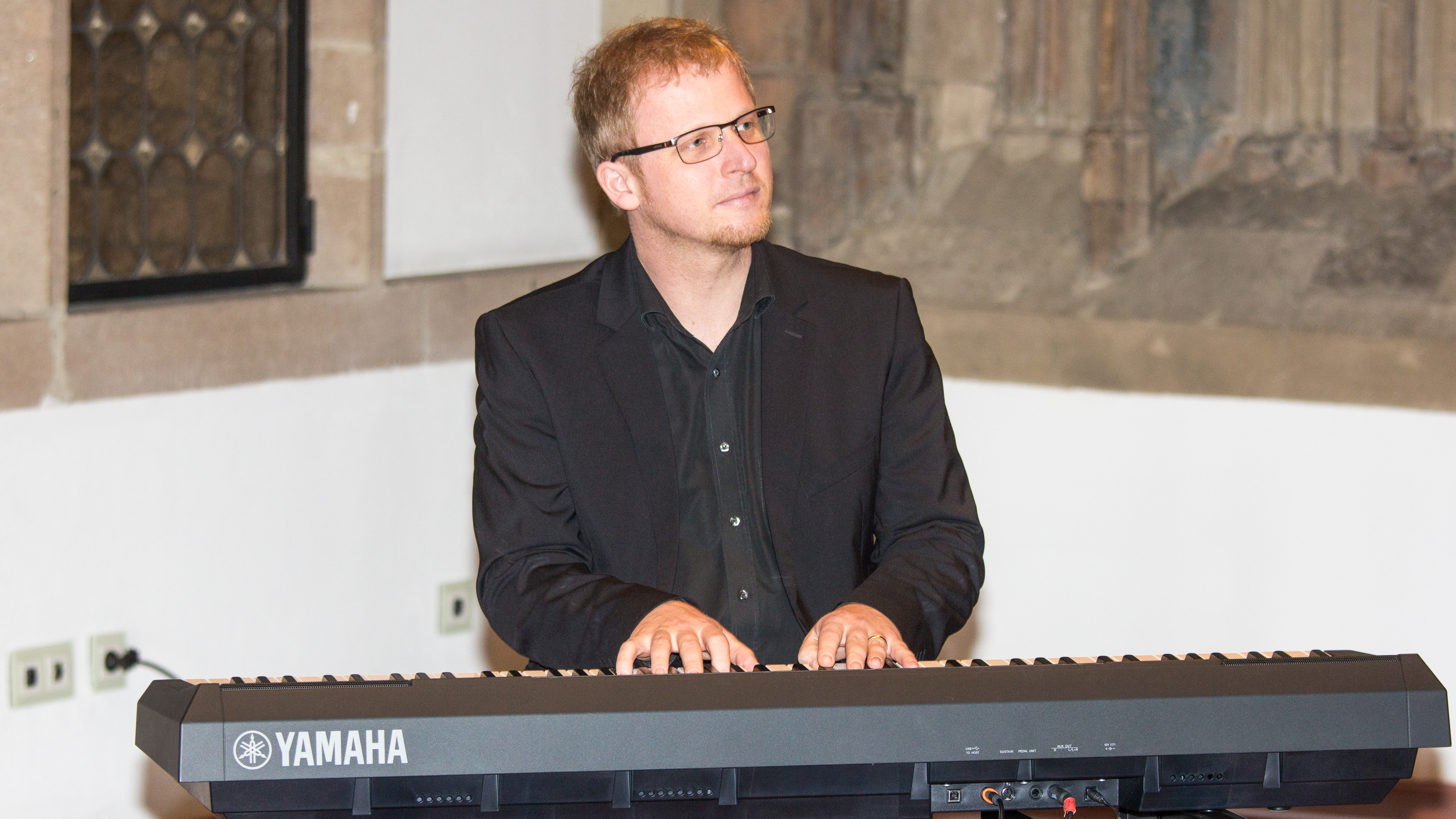 Empfang für Fritz Schramma im Kölner Rathaus zum 70. Geburtstag zu einem Jazz-Aperitif Musiker: Tobias Weindorf (Klavier)